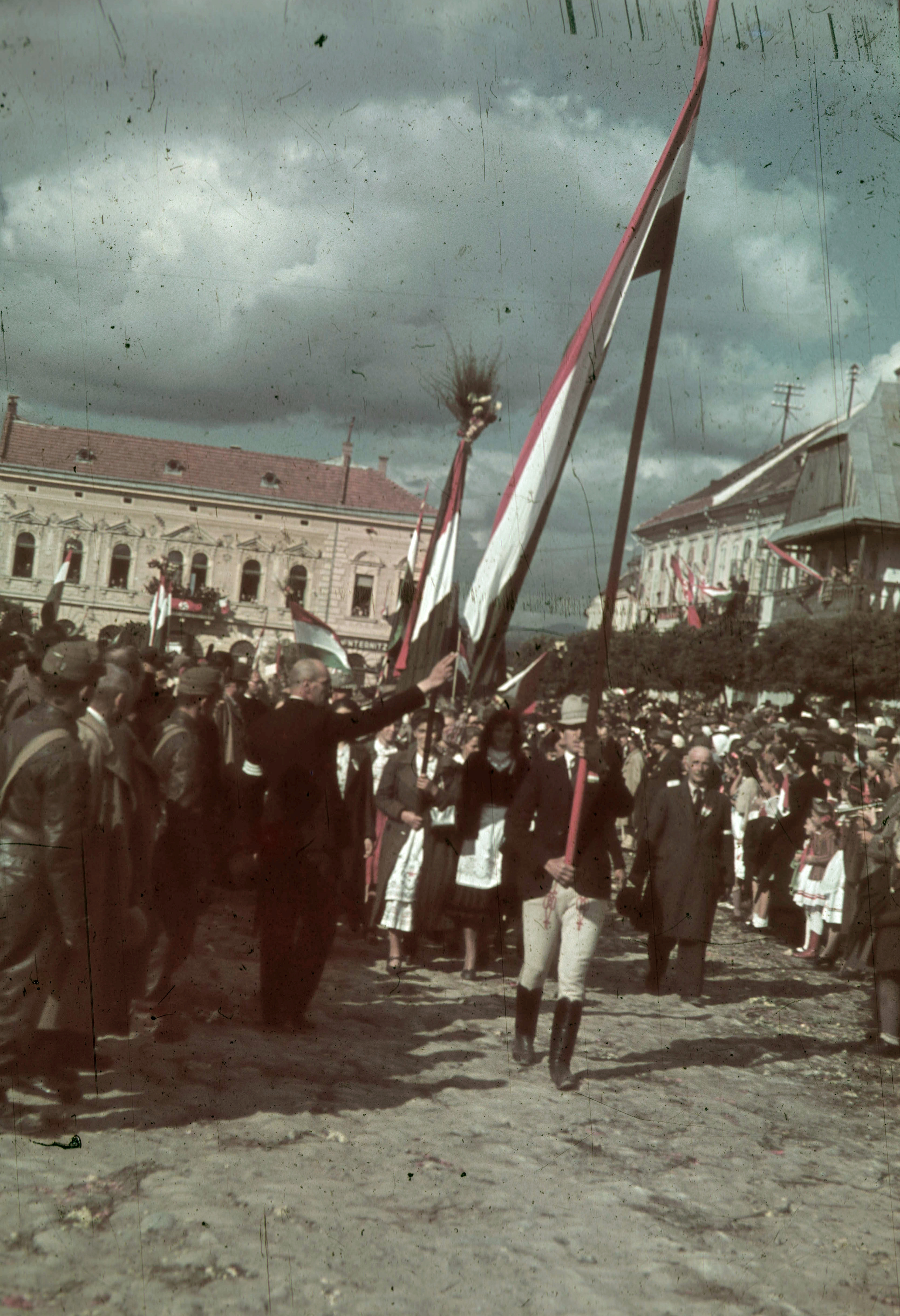 Gábor Áron tér a magyar csapatok bevonulása idején. A felvétel 1940. szeptember 13-án készült. Location: Romania, Transylvania, Targu Secuiesc Tags: colorful, flag, territorial gain Title: Gábor Áron tér a magyar csapatok bevonulása idején. A felvétel 1940. szeptember 13-án készült.